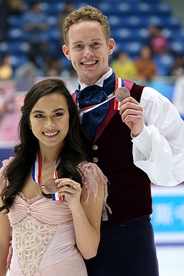 Мэдисон Чок и Эван Бейтс на Cup of China 2013